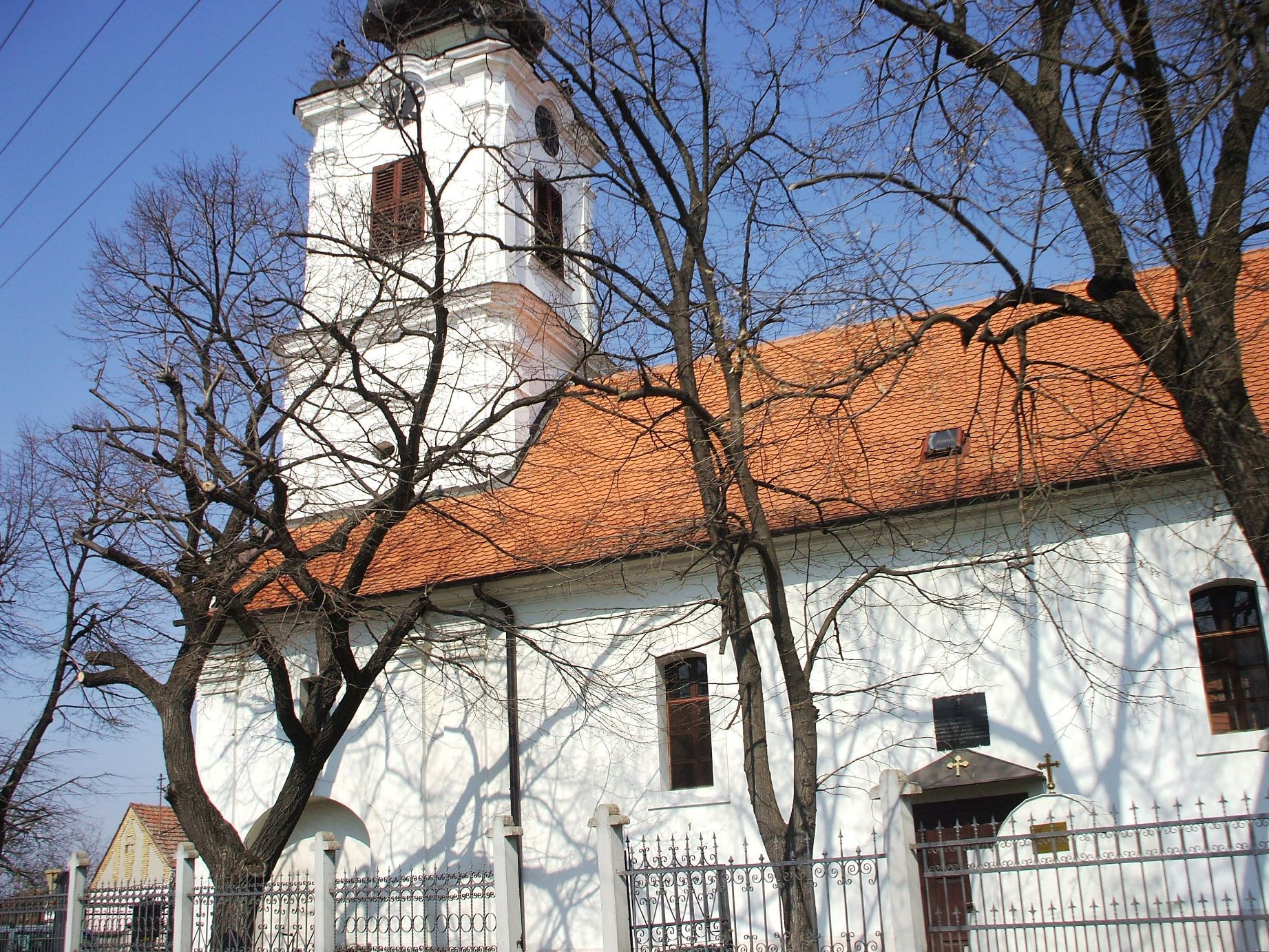 {Православна црква у Руменци